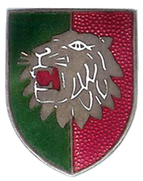 Insign du 97ème groupe de reconnaissance divisionnaire